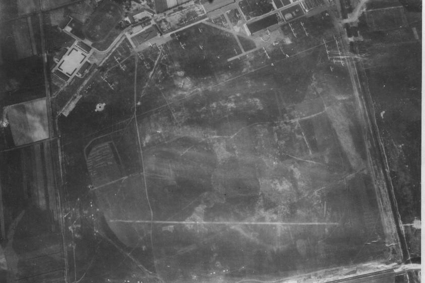 ca. 800m langes, unbefestigtes Flugfeld des Fliegerhorst Celle-Wietzenbruch